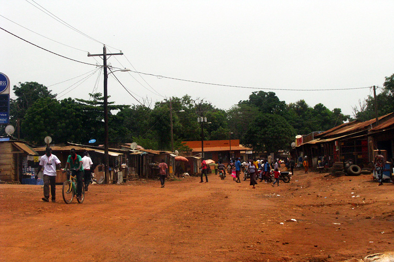 Eine Straße in Yei, Südsudan (Juni 2013)